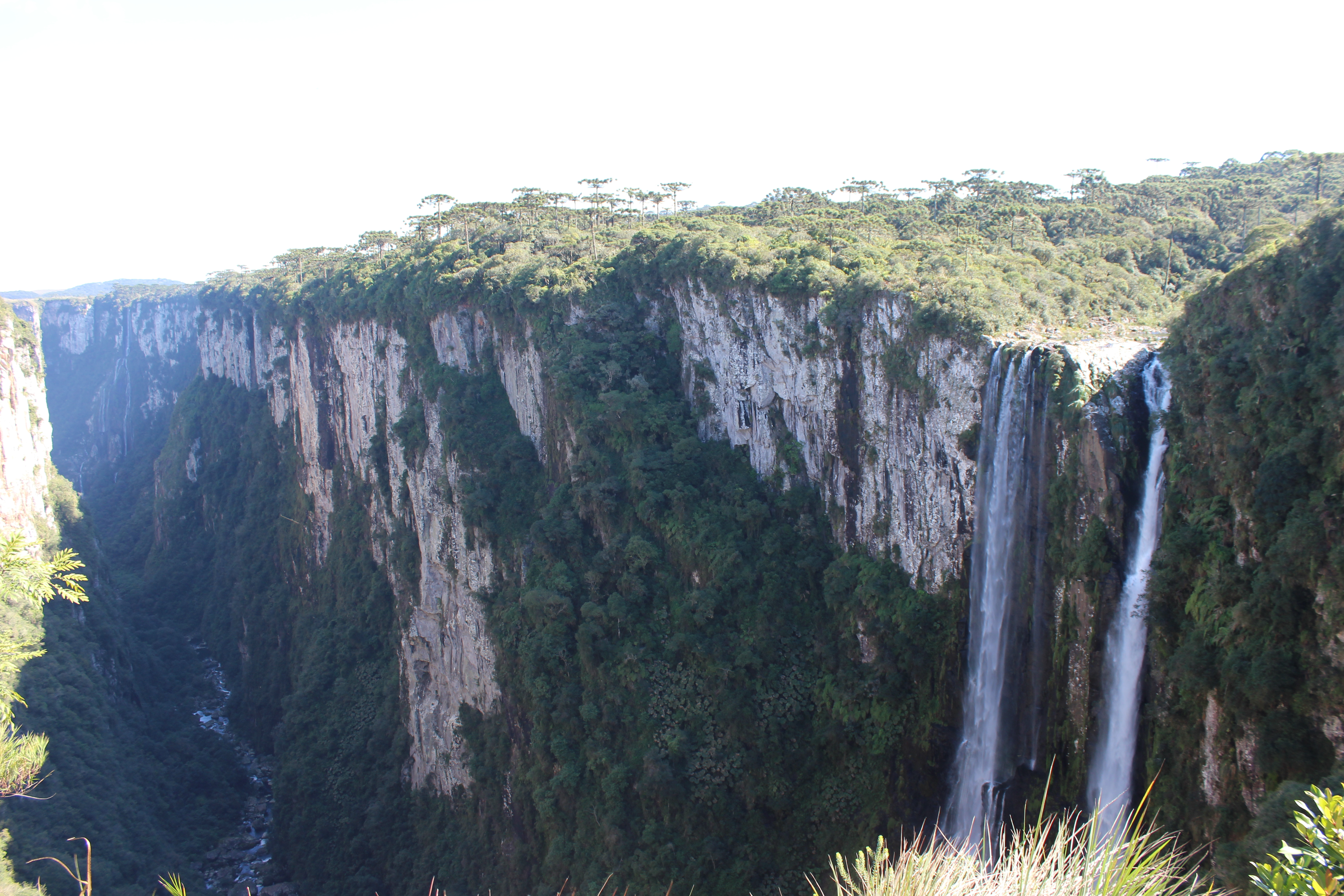 Foto da cachoeira Véu de Noiva no Canyon Itaimbézinho do Parque Nacional dos Aparados da Serra, ela forma o rio que corre por grande parte do belíssimo Canyon